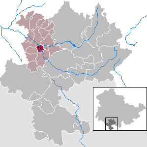 Grimmelshausen in Thuringia - district Hildburghausen